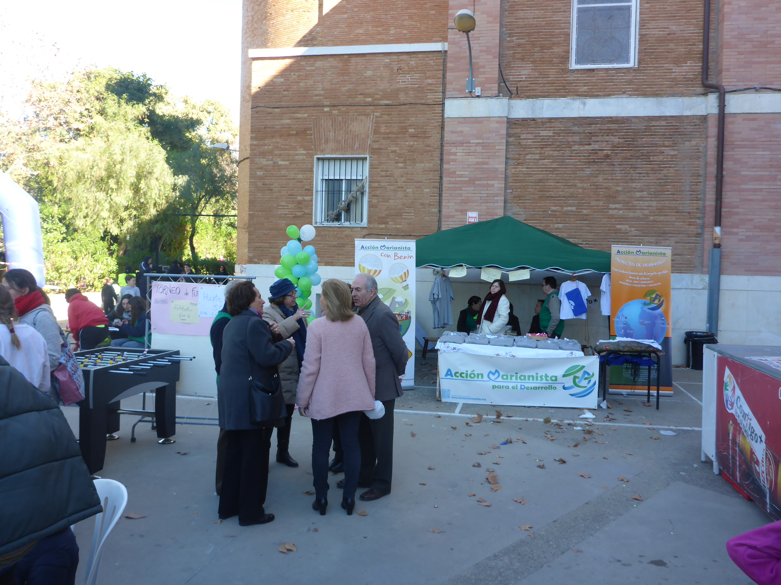 Semana del Beato Guillermo José Chaminade 2017 en el Colegio Nuestra Señora de El Pilar, Jerez de la Frontera (Andalucía, España)